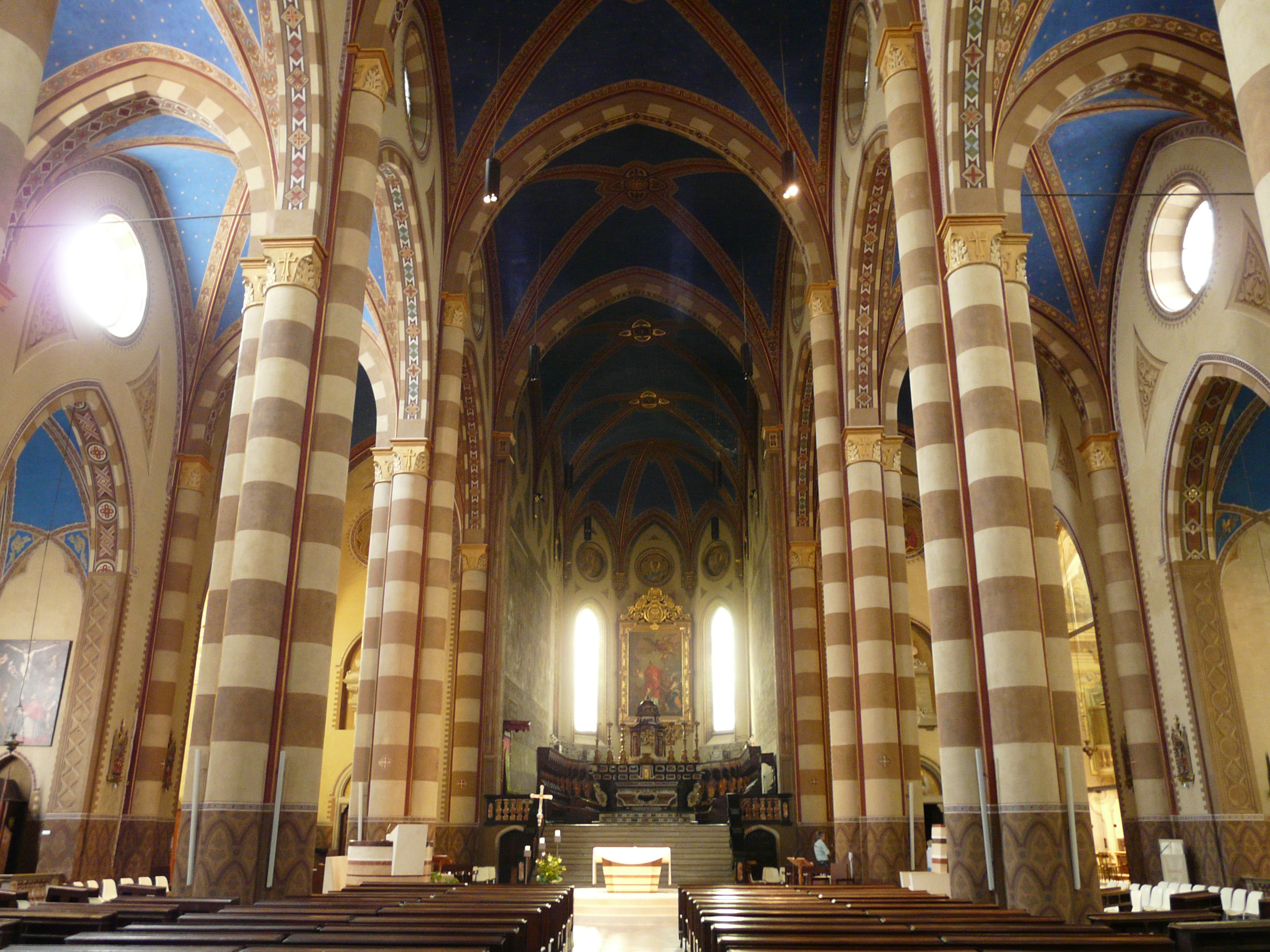 Navata maggiore del Duomo, Alba, Piemonte, Italia